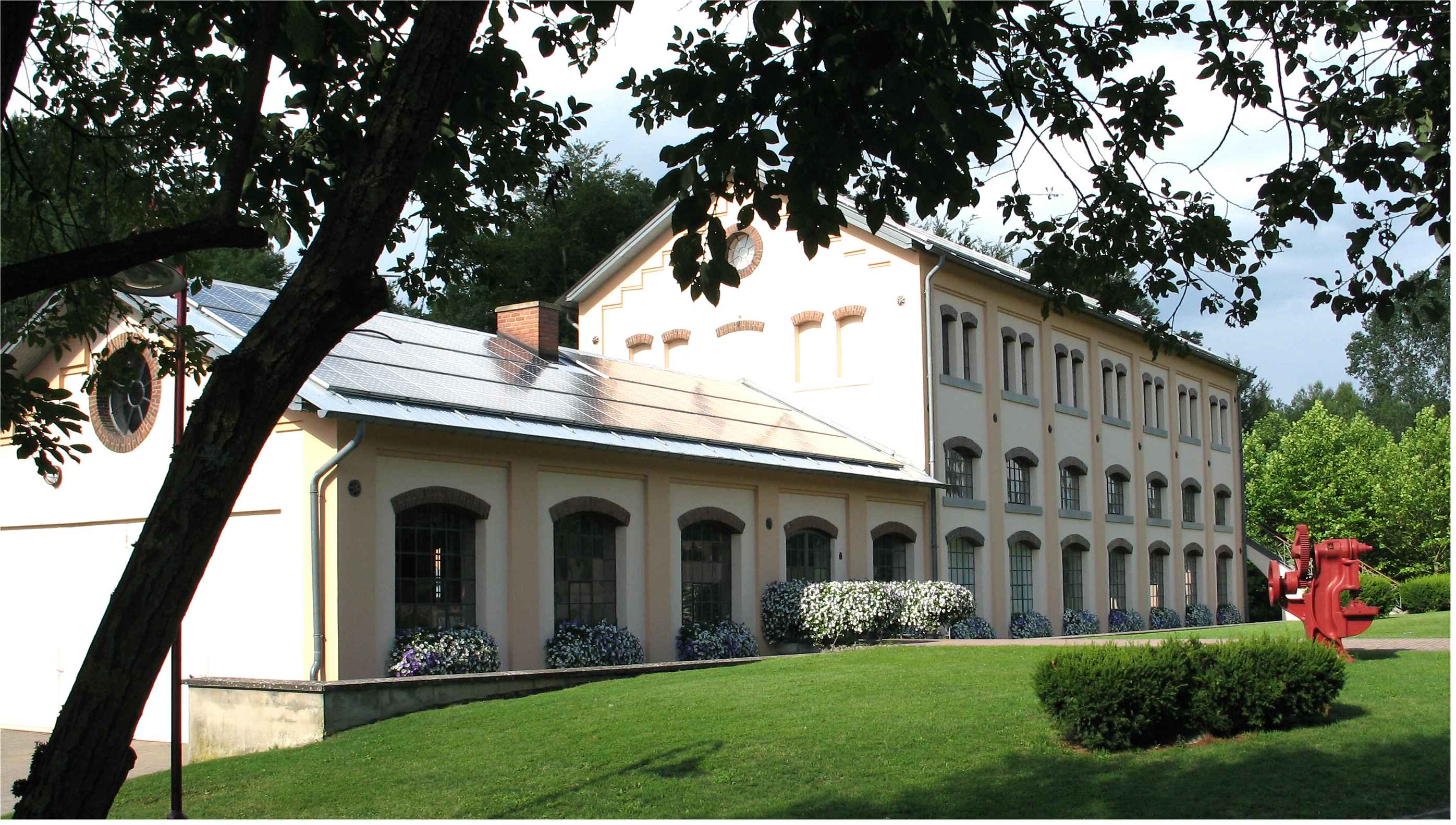 Déi al Schmelz zu Stengefort Kategorie:Gemeng Stengefort